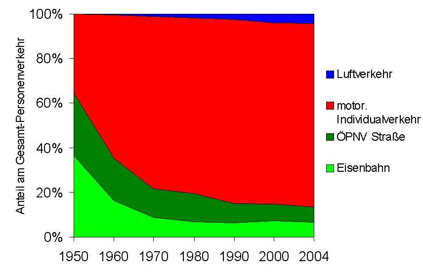 Anteil der verschiedenen Verkehrsträger (Personenverkehr) an der Verkehrsleistung in Deutschland